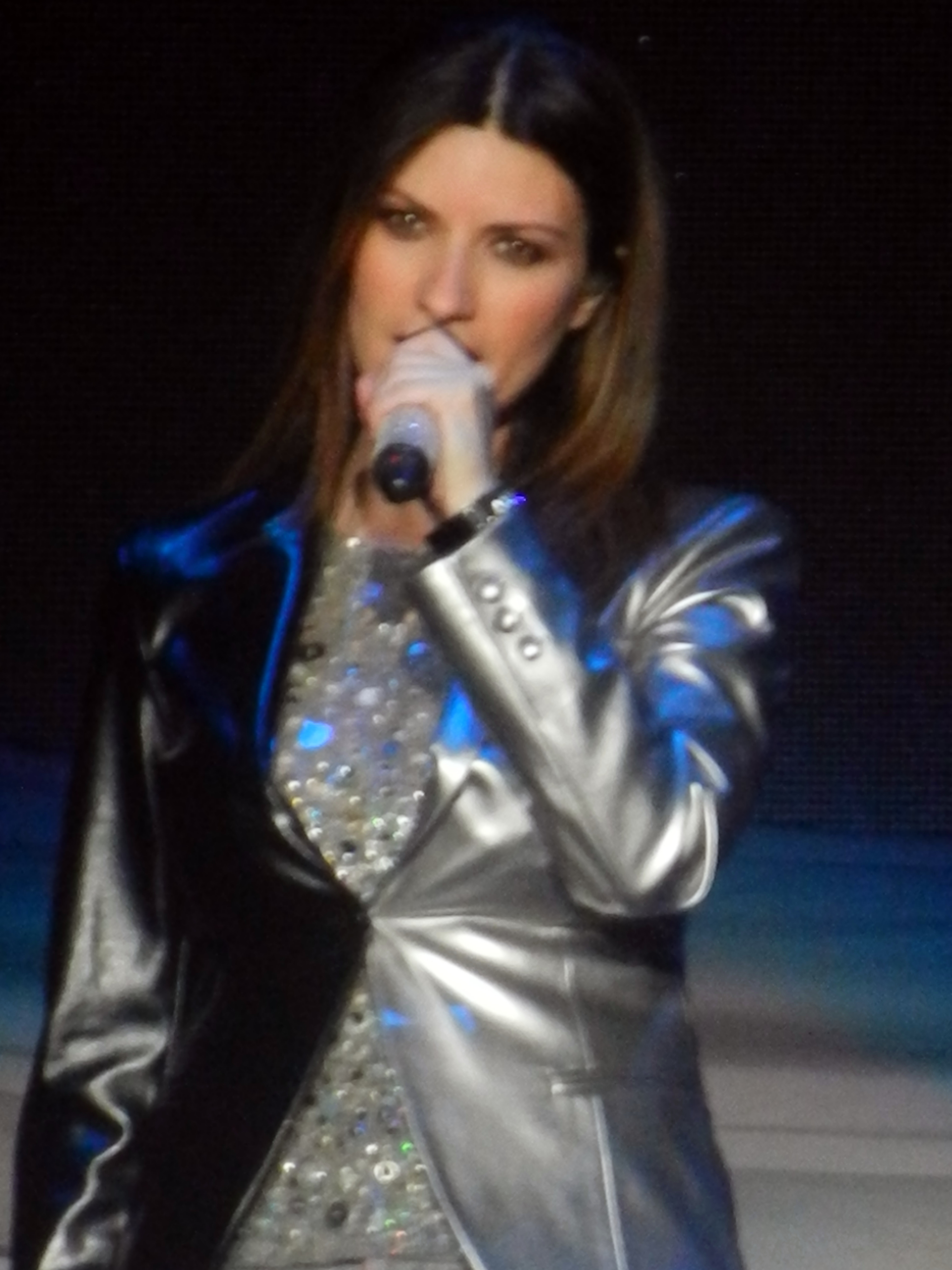 Laura Pausini 15 - Bercy - Avril 2012